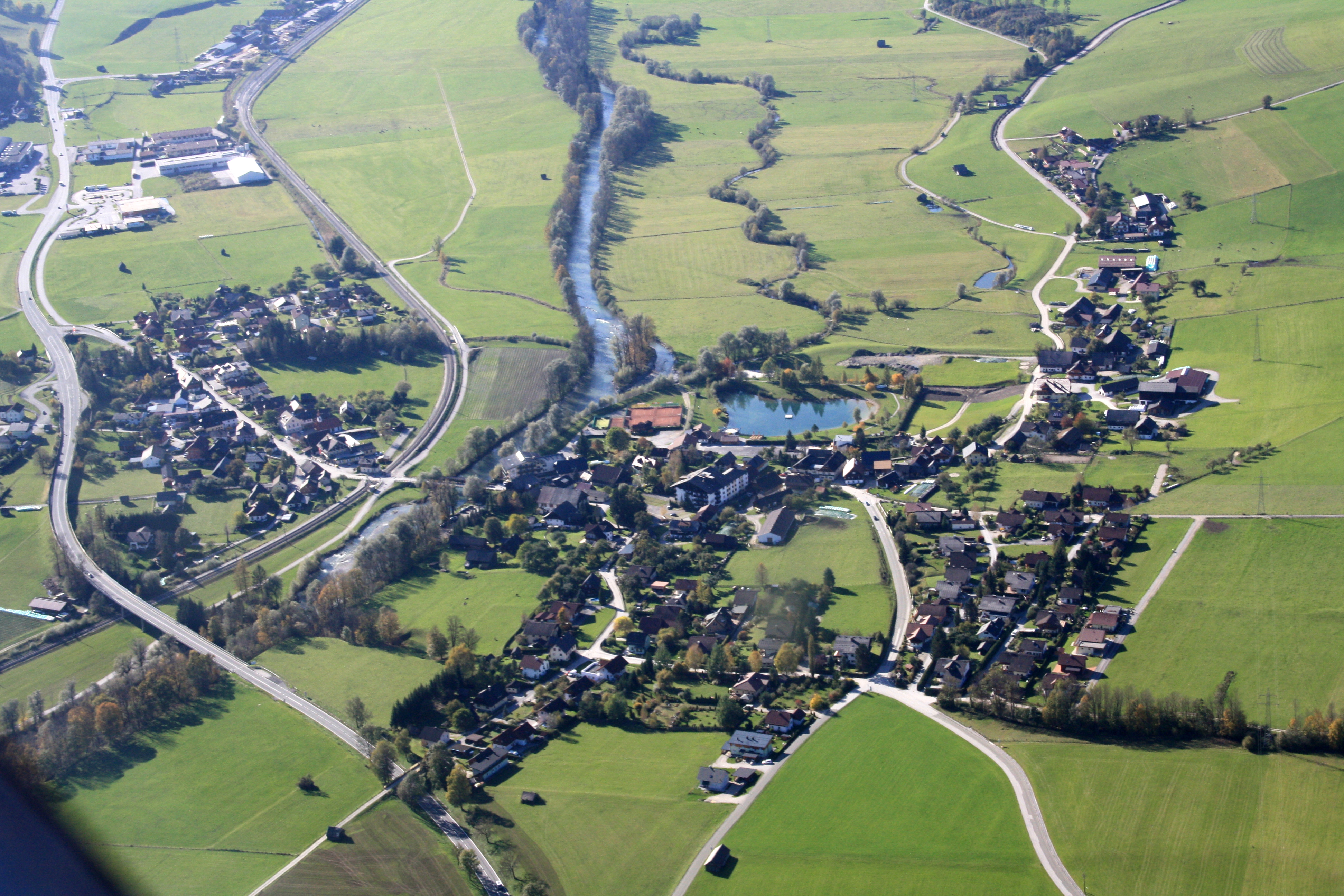 Aich, Luftbild 2012